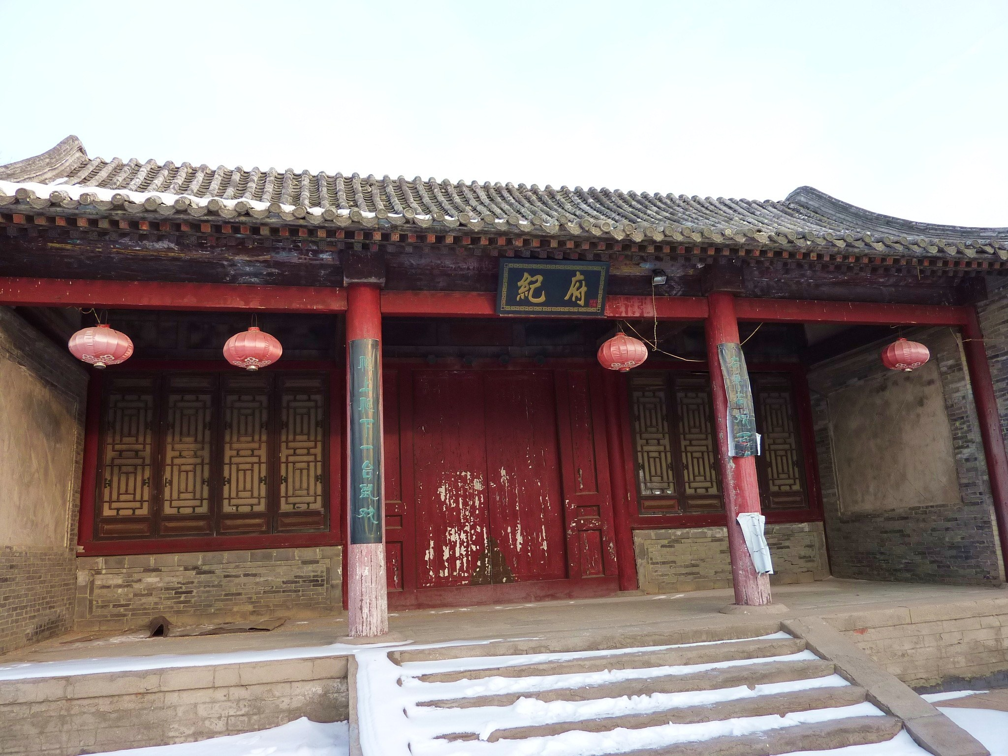 ·˙·ChinaUli2010·.· Beijing